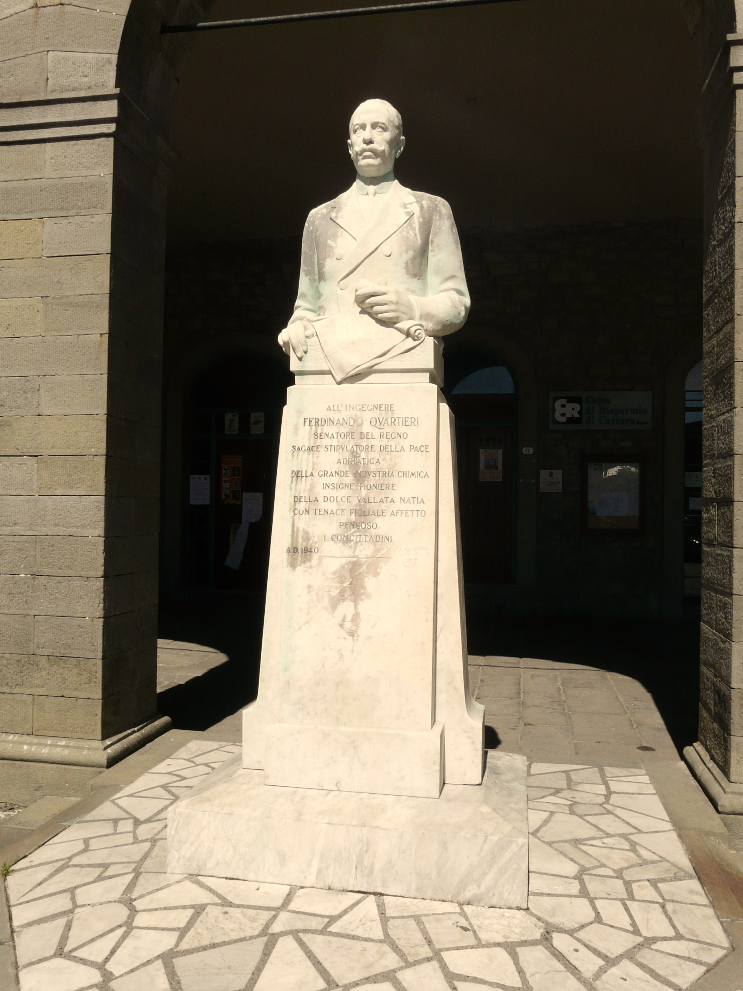 Monumento all'ingegener Ferdinando Quartieri, Bagnone, Toscana, Italia.